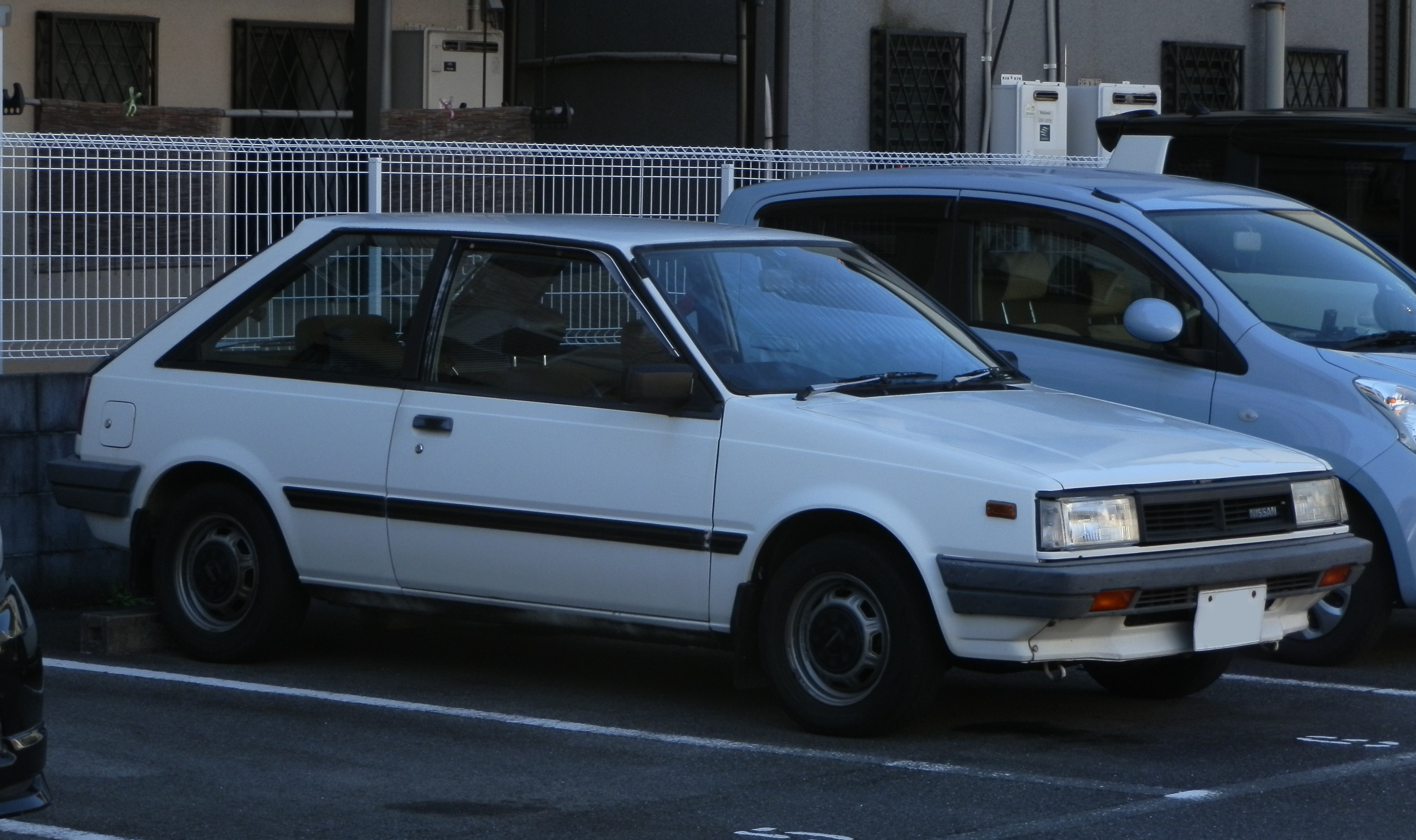 nissan sunny hatchback B12